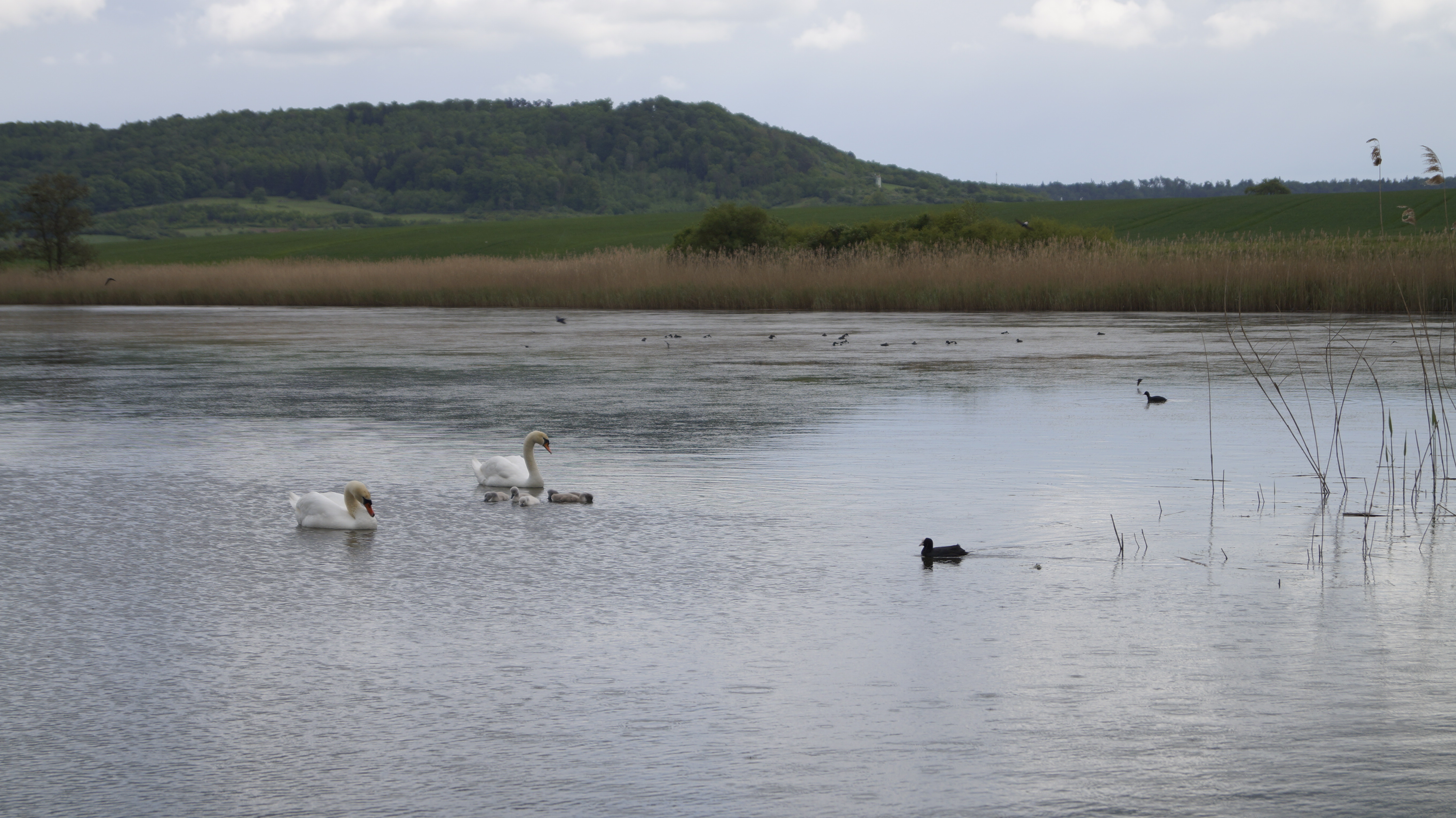 Schwanenfamilie, Großer Lindleinsee bei 91541 Rothenburg ob der Tauber in Bayern